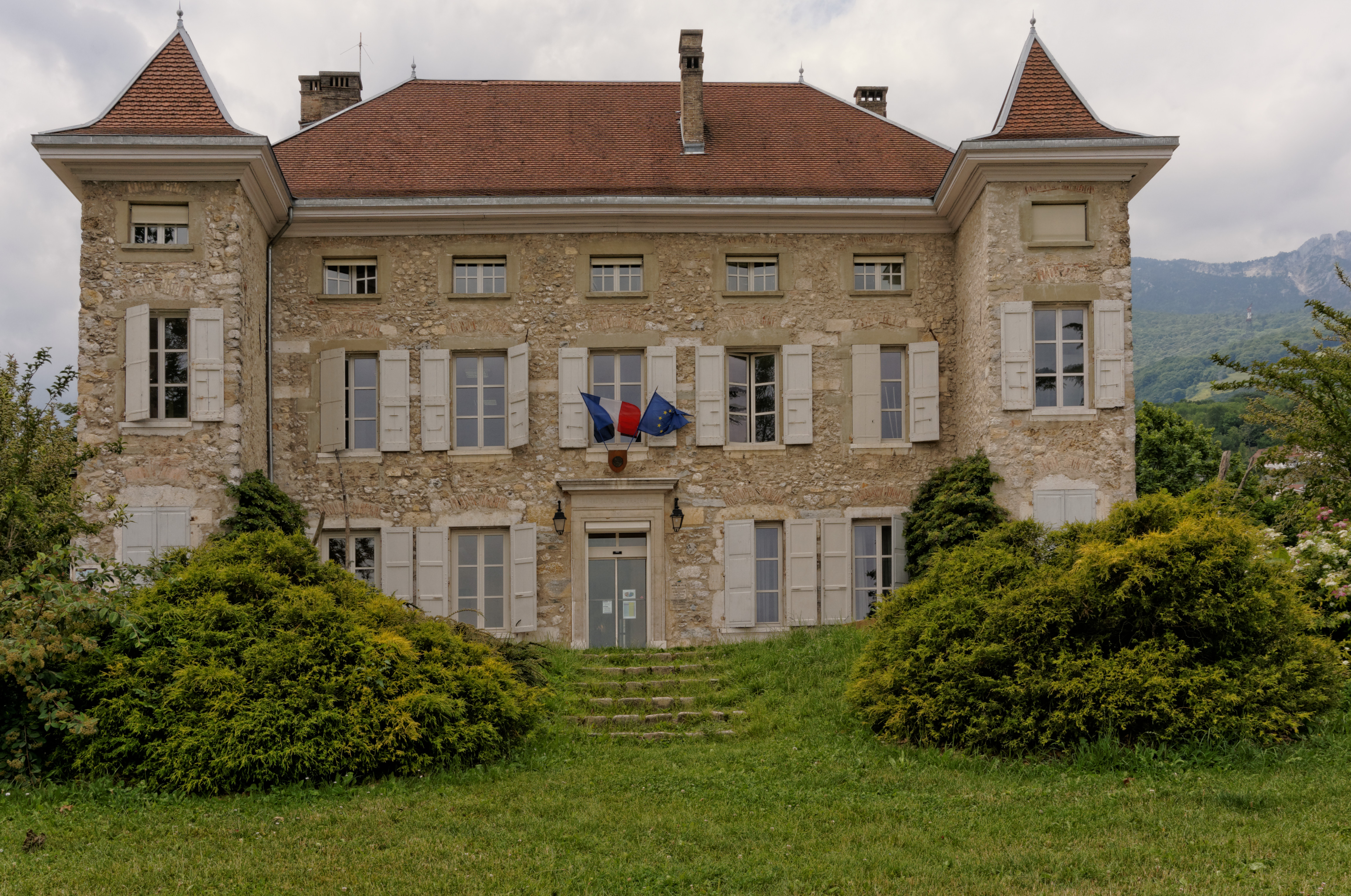 La mairie de Seyssins (Isère)